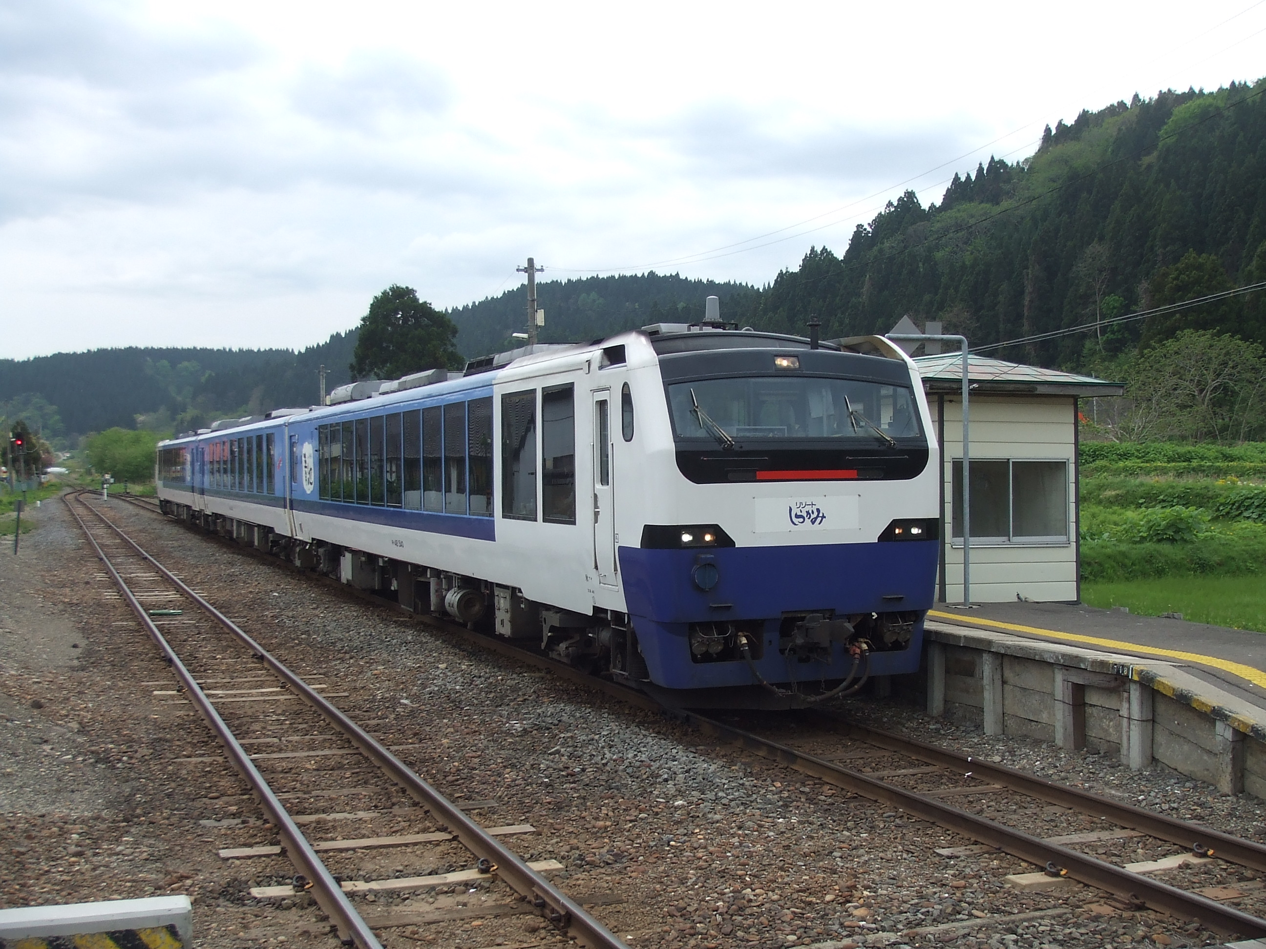 北金ヶ沢駅 駅構内の様子